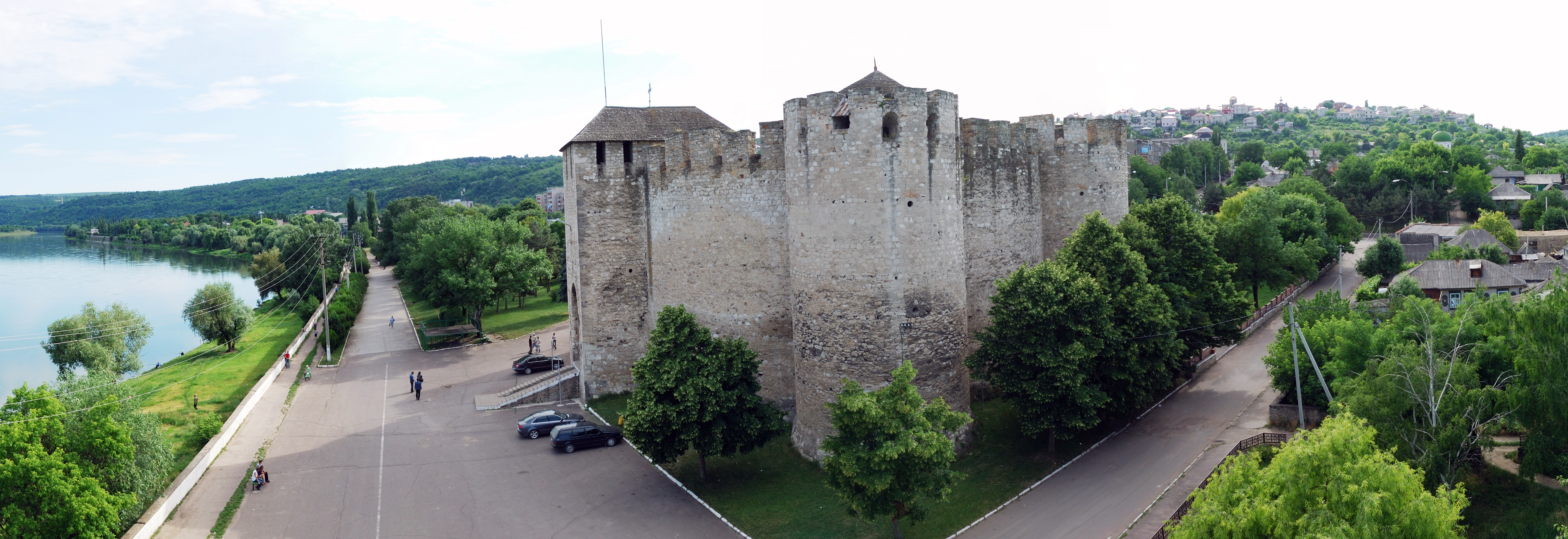 Fortăreaţa din Soroca se evidenţiază dintre celelalte cetăţi româneşti, prin faptul că intrarea principală este păzită de către flancuri, are un sistem concentric de apărare, iar rotunjimea o aduce aproape de perfecţiune.